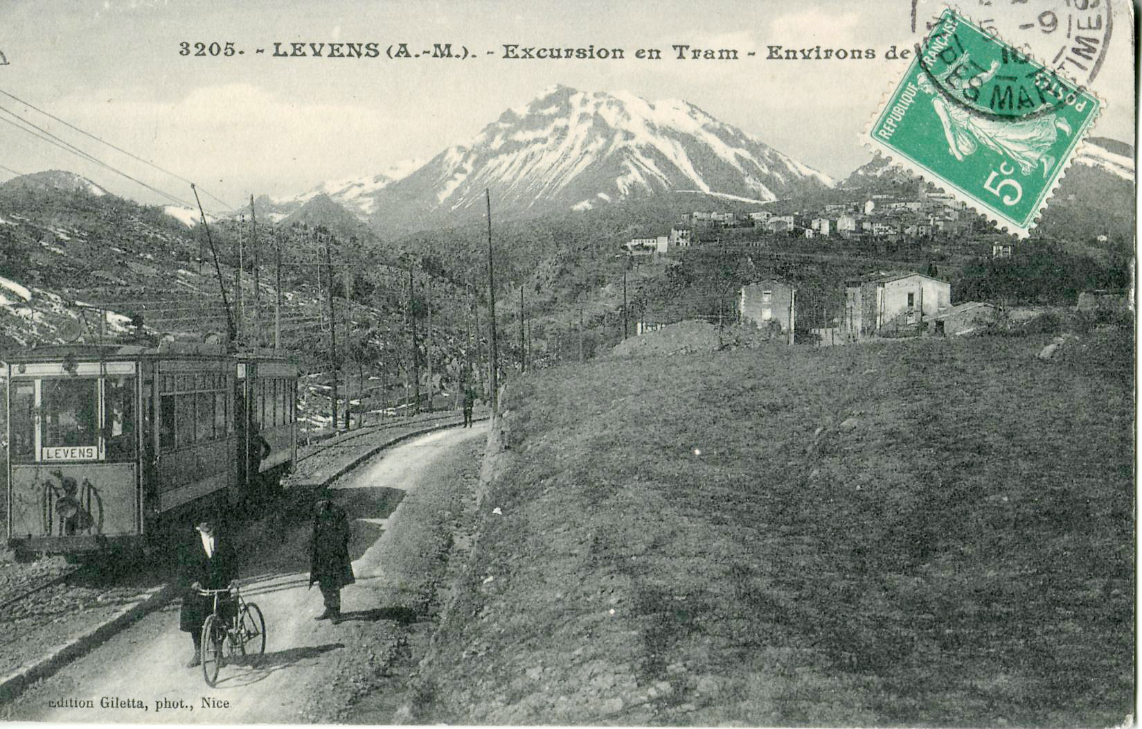 Carte postale ancienne éditée par Giletta à Nice, n°3205 :LEVINS - Excusion en Tram - Environs de Nice